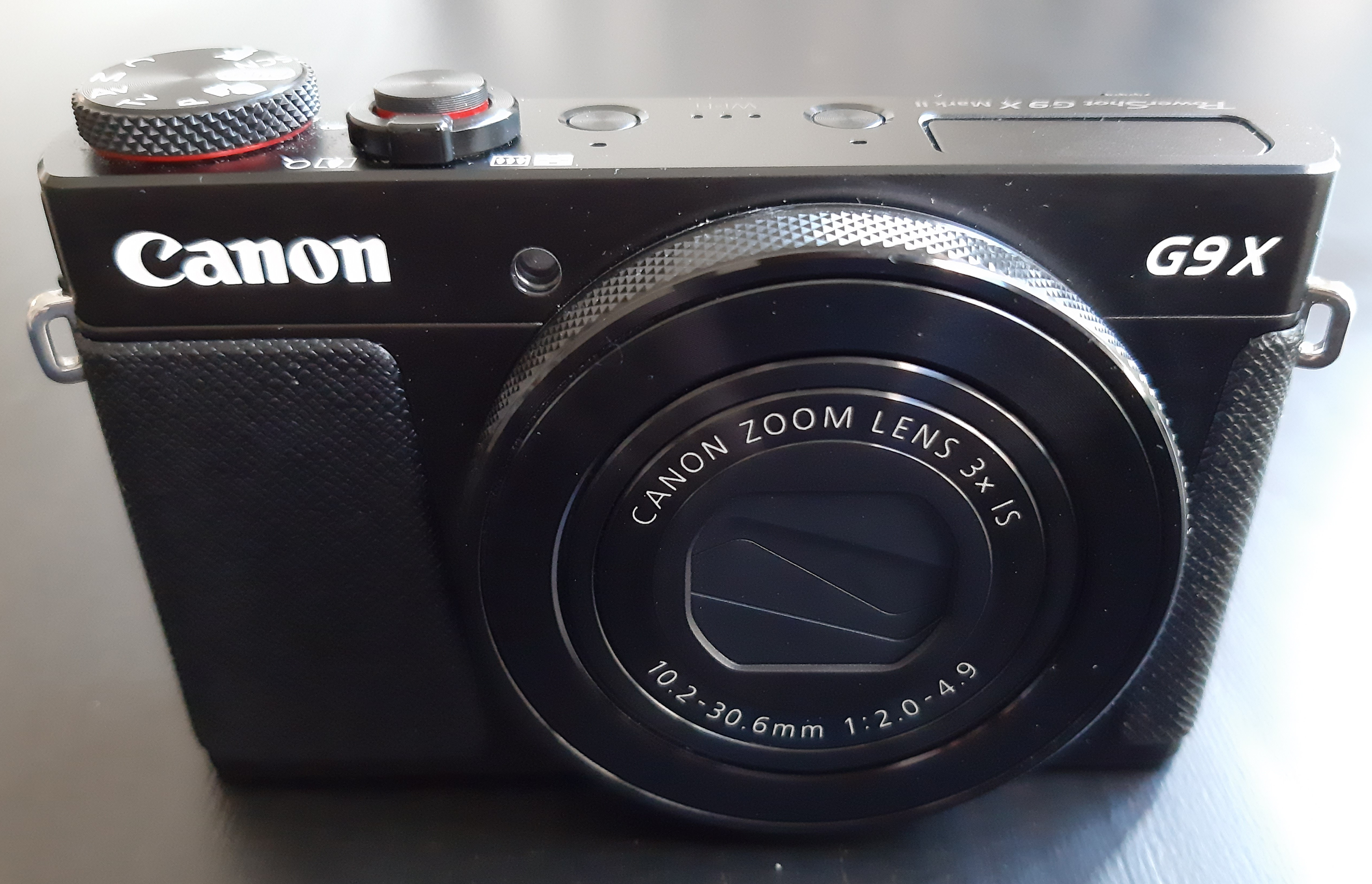 Canon PowerShot G9 X Mark II från framsidan.